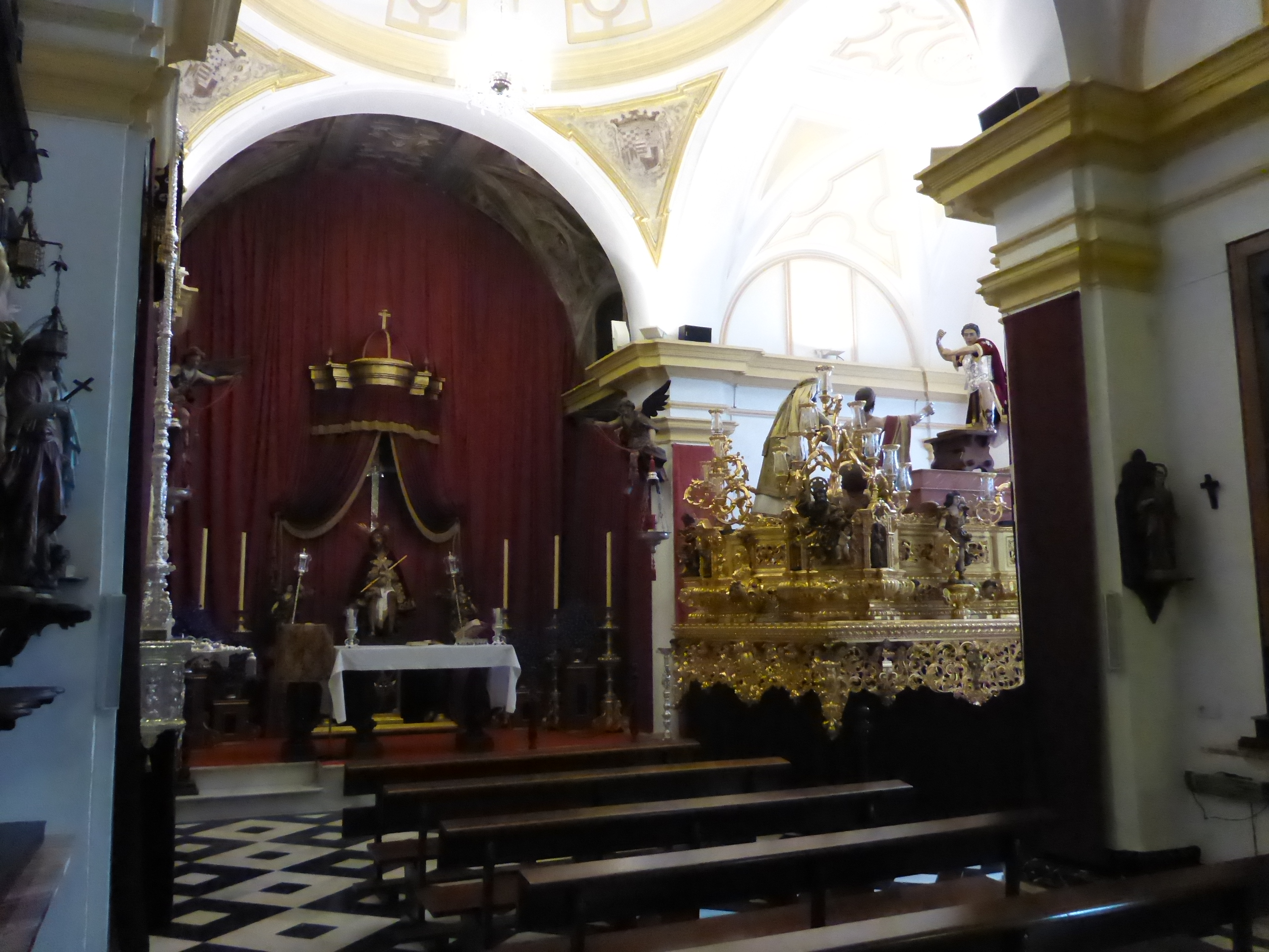 Interior de la Capilla del Refugio de Nuestra Señora de los Desamparados de Jerez de la Frontera (Andalucía, España)